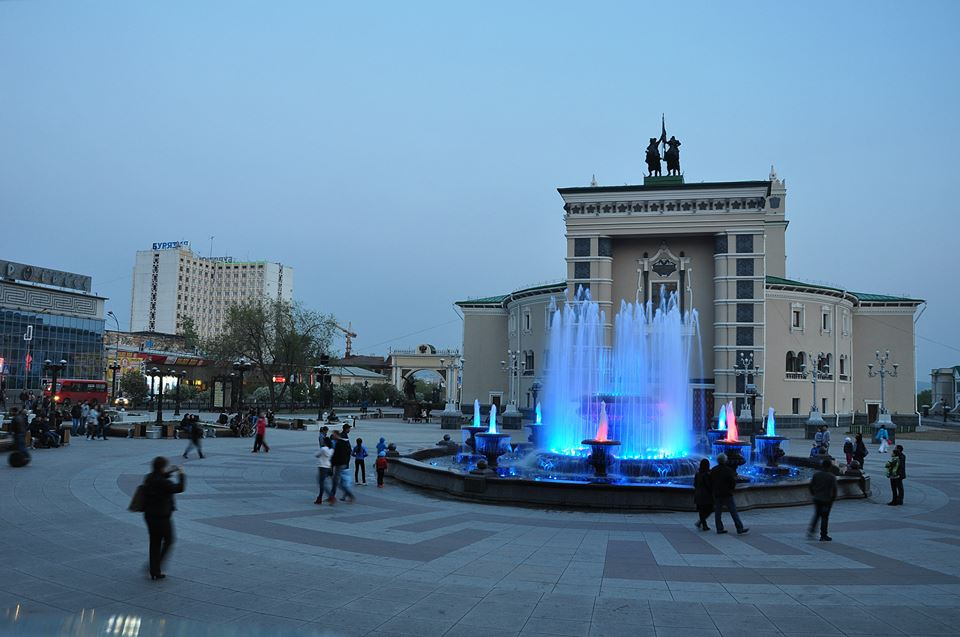 Opera and Ballet Theater in Ulan-Ude